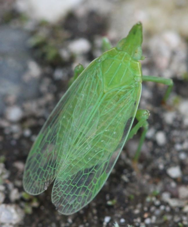 Dictyophara europaea am 4.9.2017 in der Schwetzinger Hardt